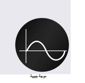 اشارة جيبية